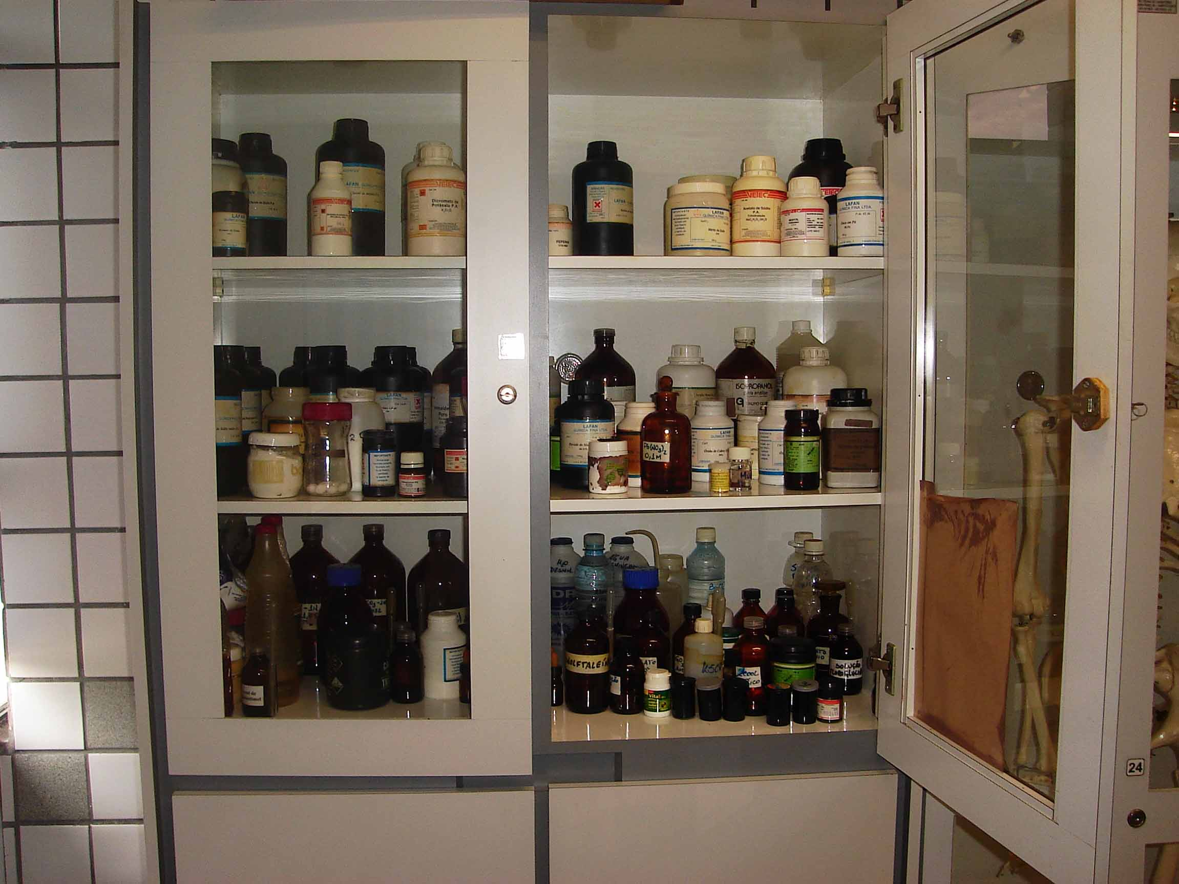 Armário de reagentes; Reagents